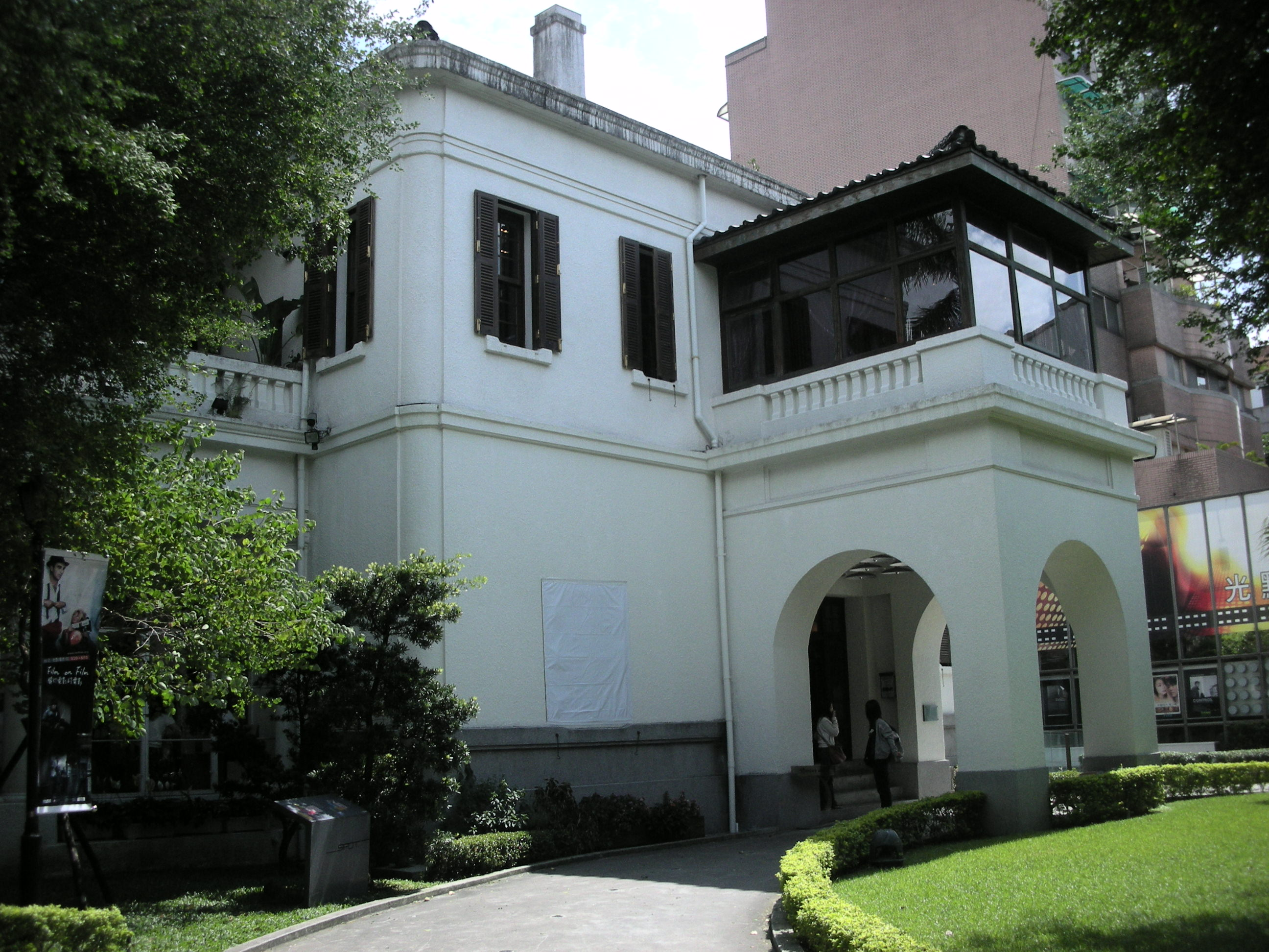 台北市建築物